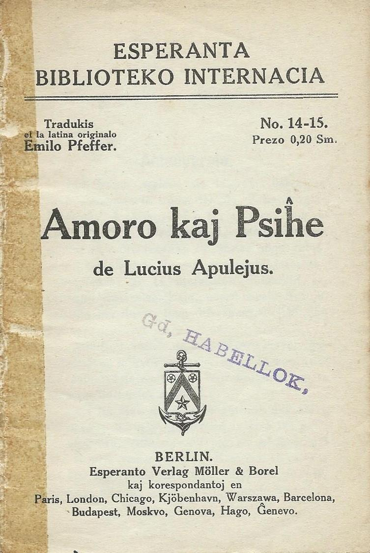 librokovrilo de libro "Amoro kaj Psiĥe", 1910